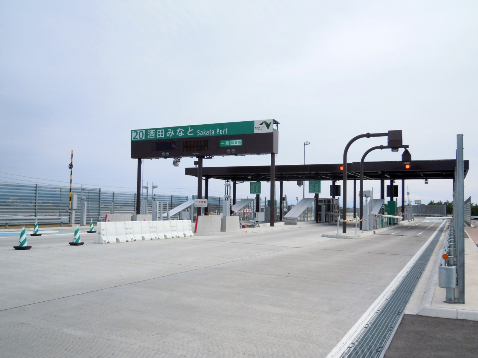 山形県酒田市にある日本海東北道の酒田みなと本線料金所。